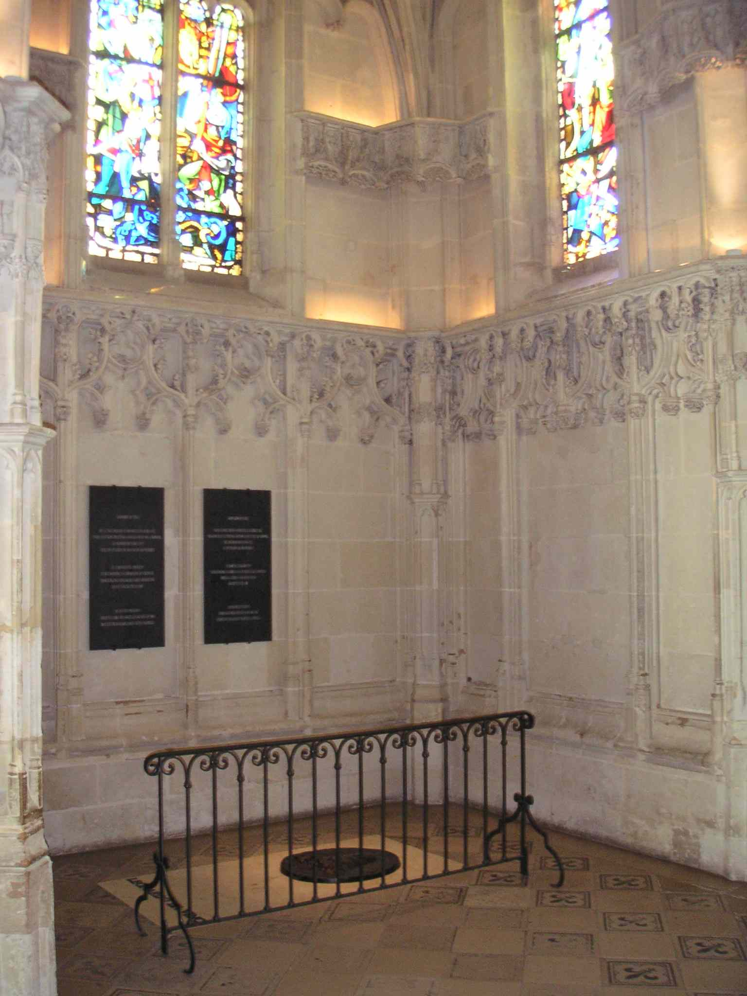 Hier ist der Ruheplatz von Leonardo da Vinci.